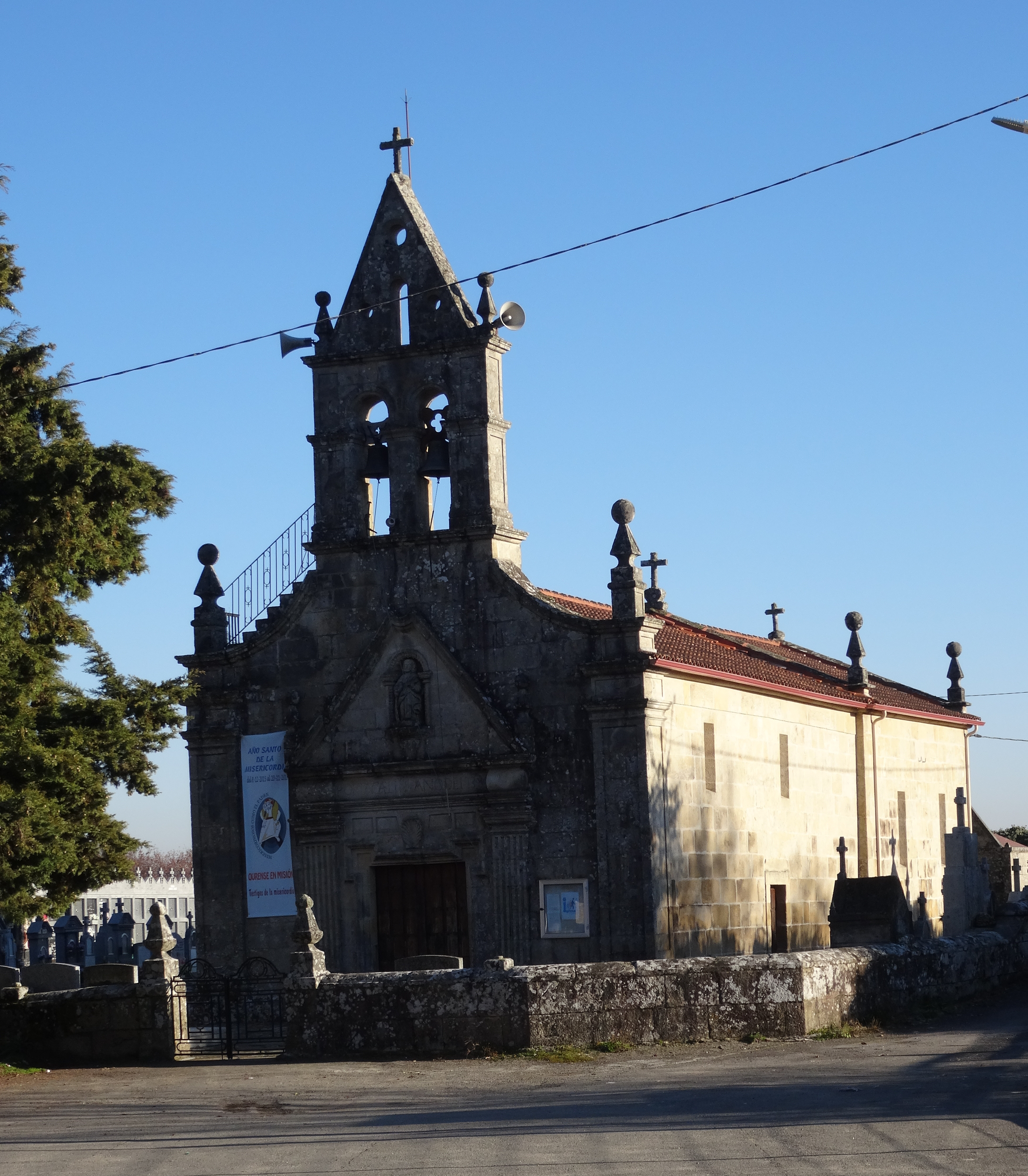 Ver título.